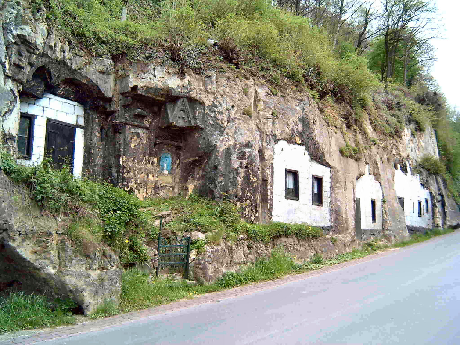 Rotswoningen in Geulhem, gemeente Valkenburg aan de Geul